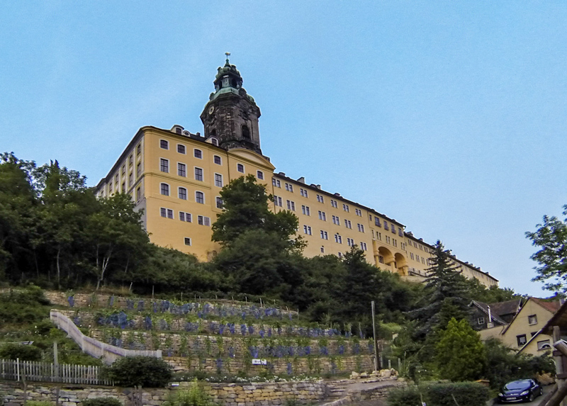 Das Residenzschloss Heidecksburg in Rudolstadt ist eines der prachtvollsten Barockschlösser in Thüringen. Ein Blick von der Alten Straße.